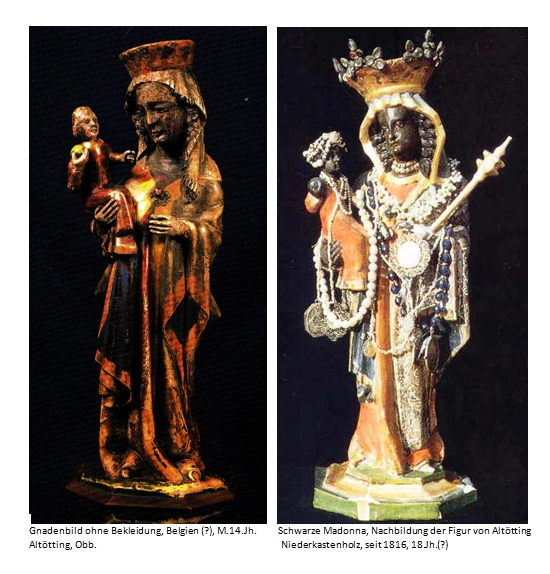 Schwarze Madonnen: links Altötting – rechts Niederkastenholz. Bild Altötting aus: Schöne Madonnen am Rhein, hrsg. von Robert Suckale. LVR-Landesmuseum Bonn 2009, S.169. Bild Niederkastenholz, eigenes Werk